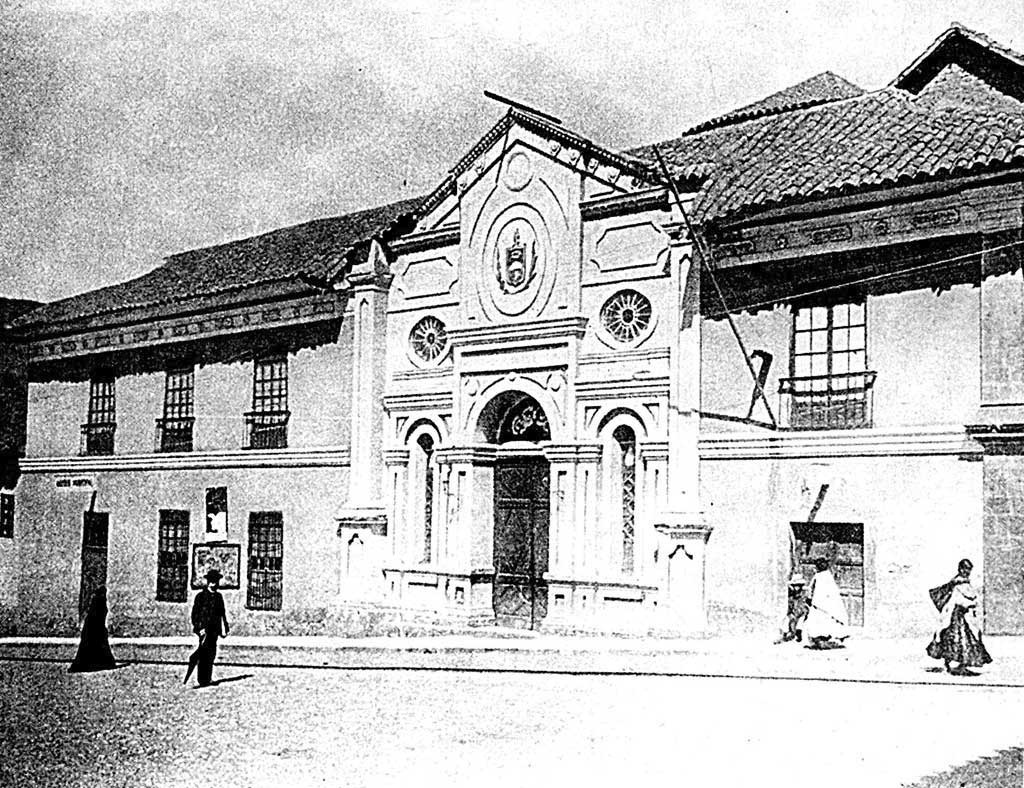 Teatro Municipal de La Paz "Alberto Saavedra Perez" 1871